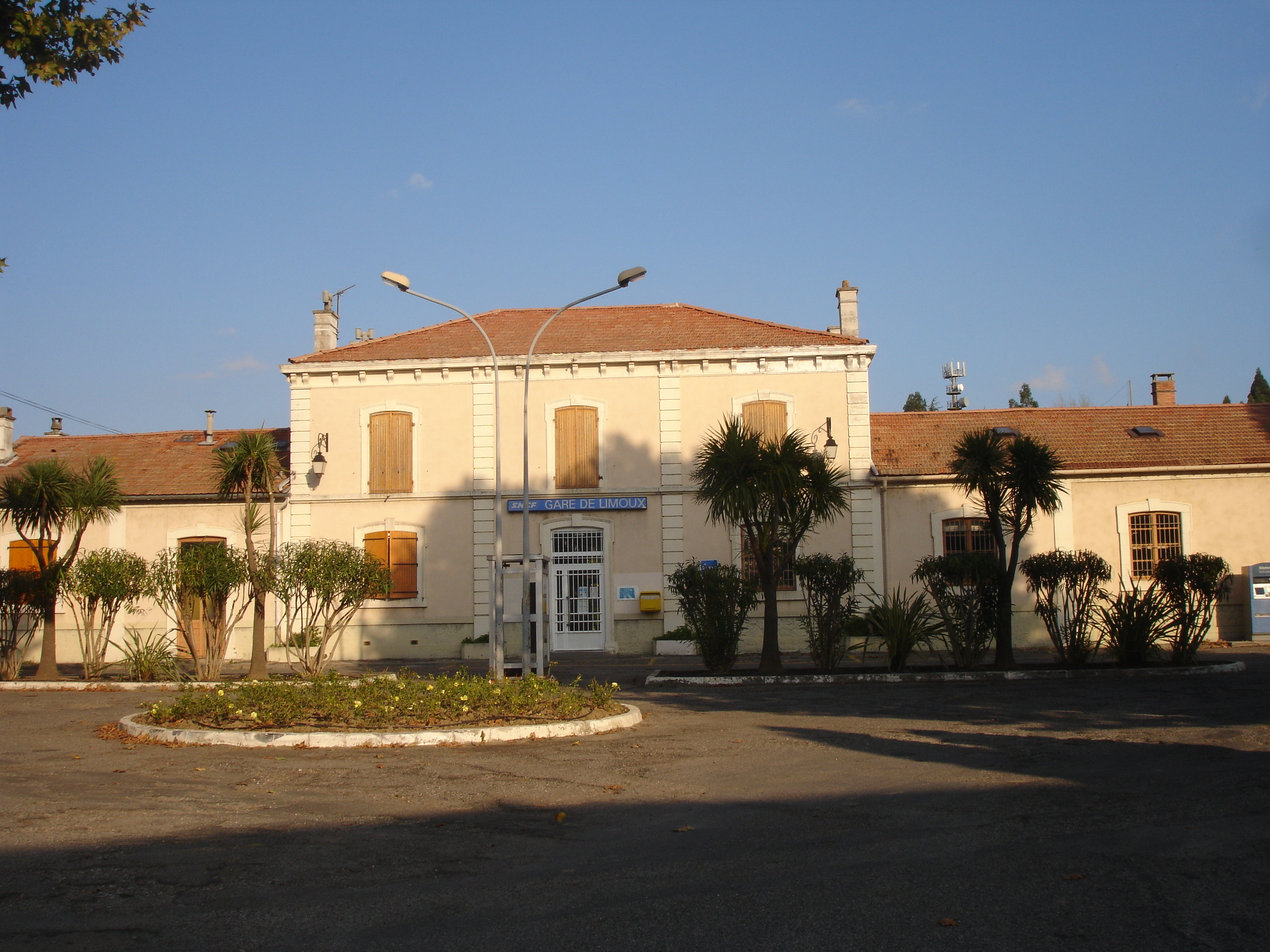 France, Aude (11), Limoux, Gare